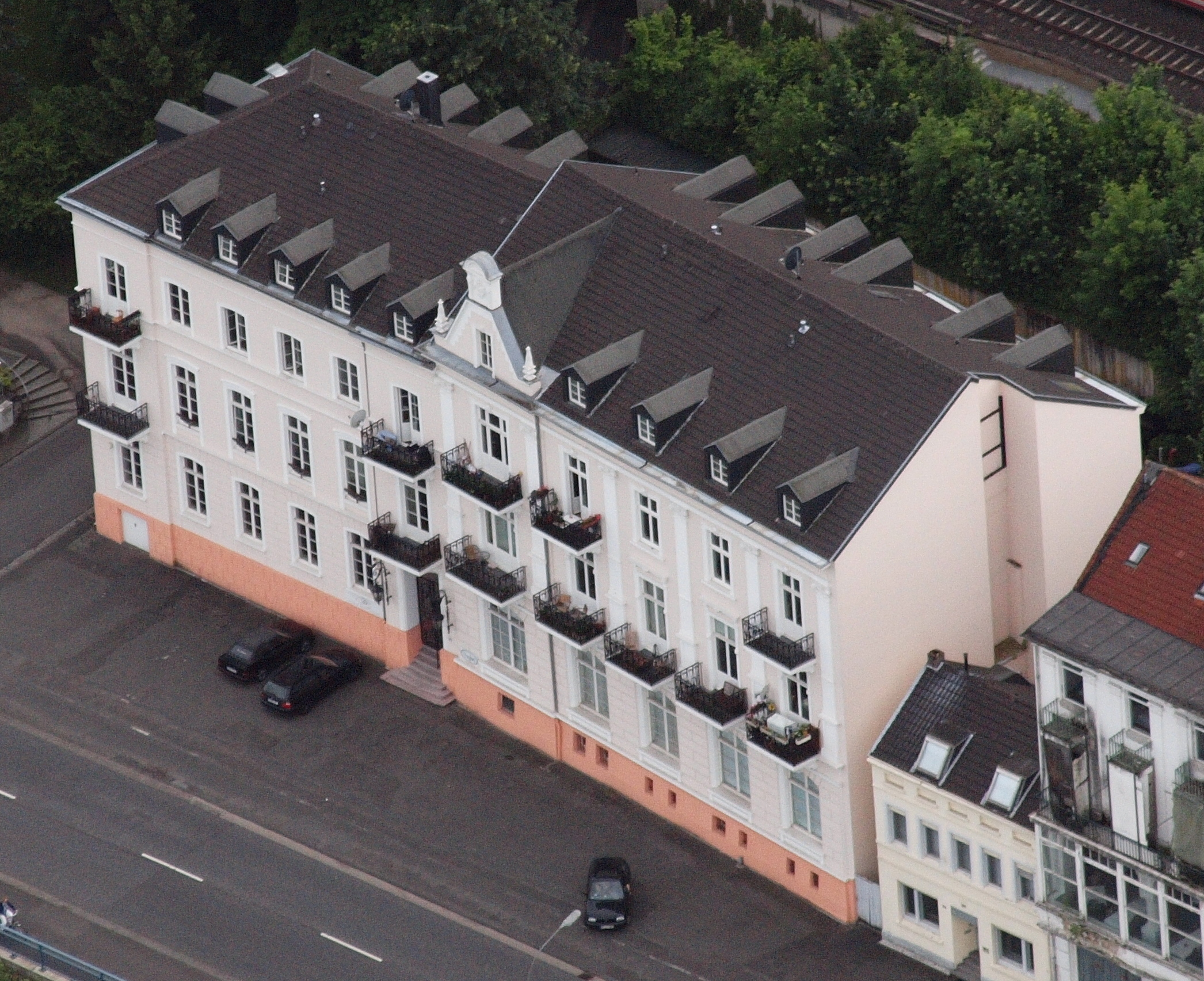 ehemaliges Hotel Rolandseck-Groyen, Mainzer Straße 28/30, Remagen: Luftaufnahme